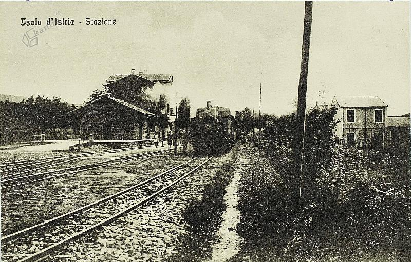 Razglednica Porečanke v Izoli.